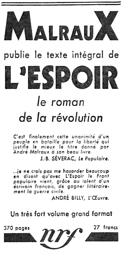 Malraux, L'Espoir, annonce commerciale dans "Le Populaire", 30 janvier 1938.